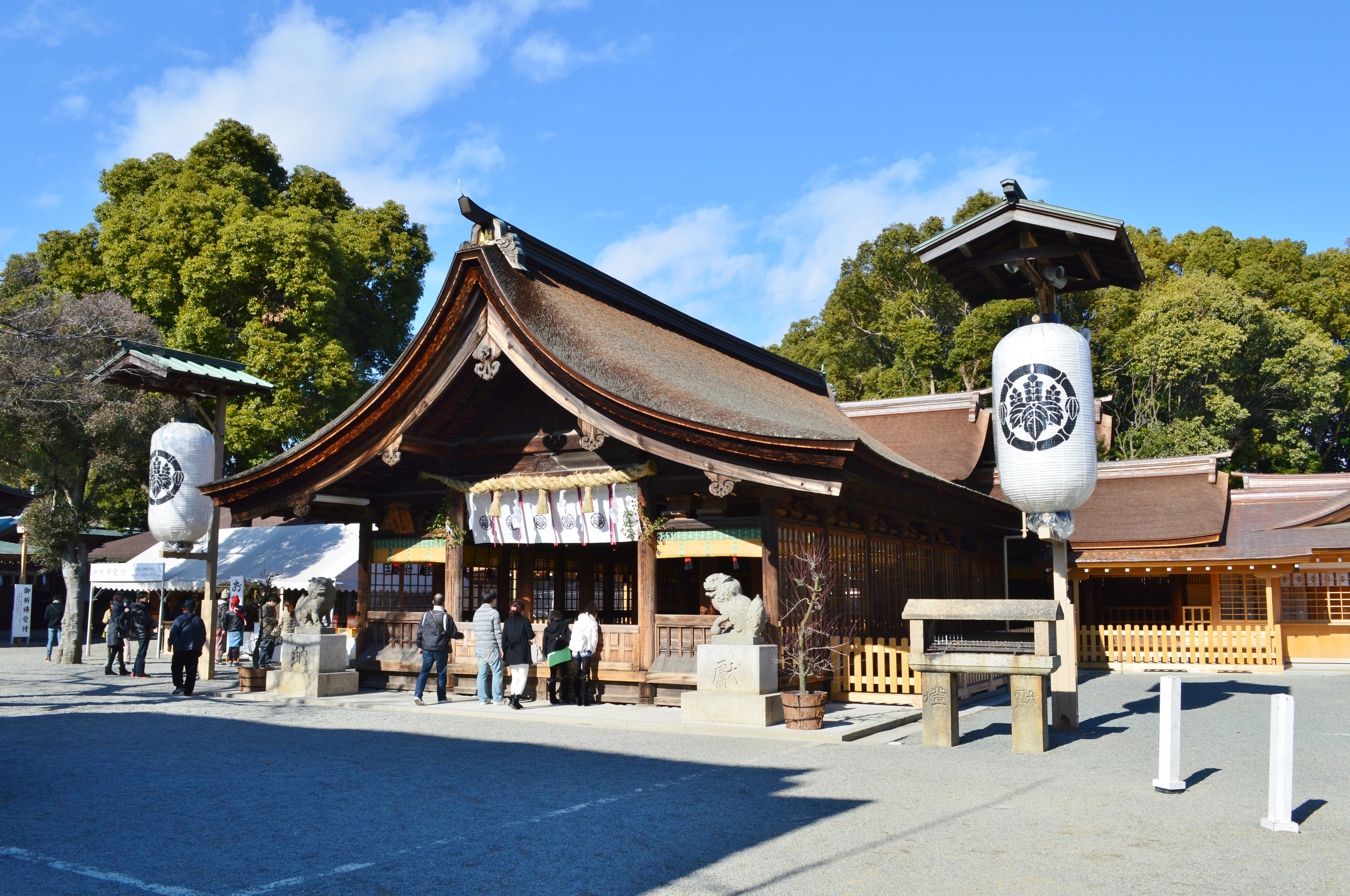 尾張大国霊神社 社殿